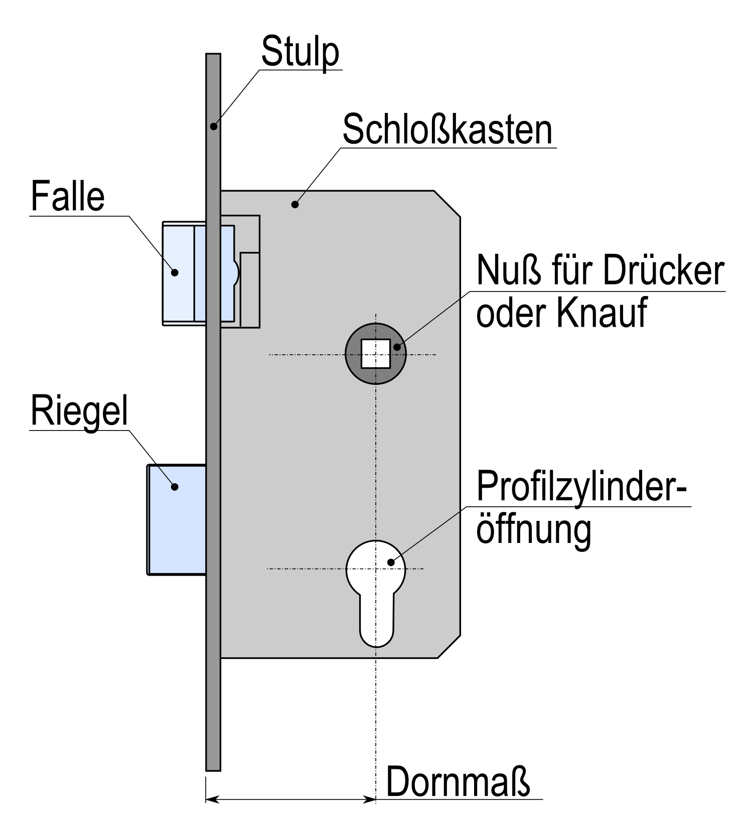 Schloßkasten und dessen Teile